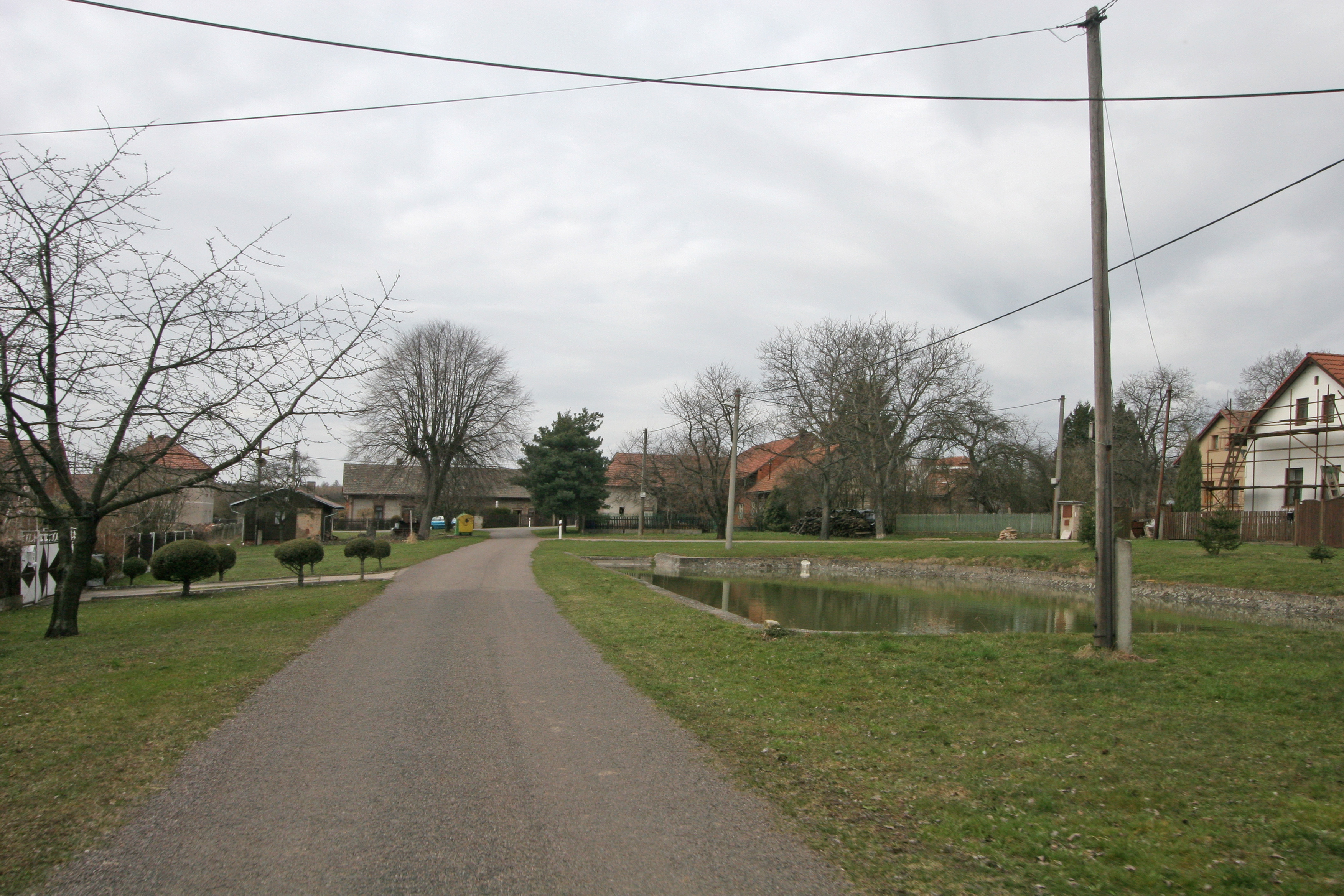 Chaloupky návesní rybníček